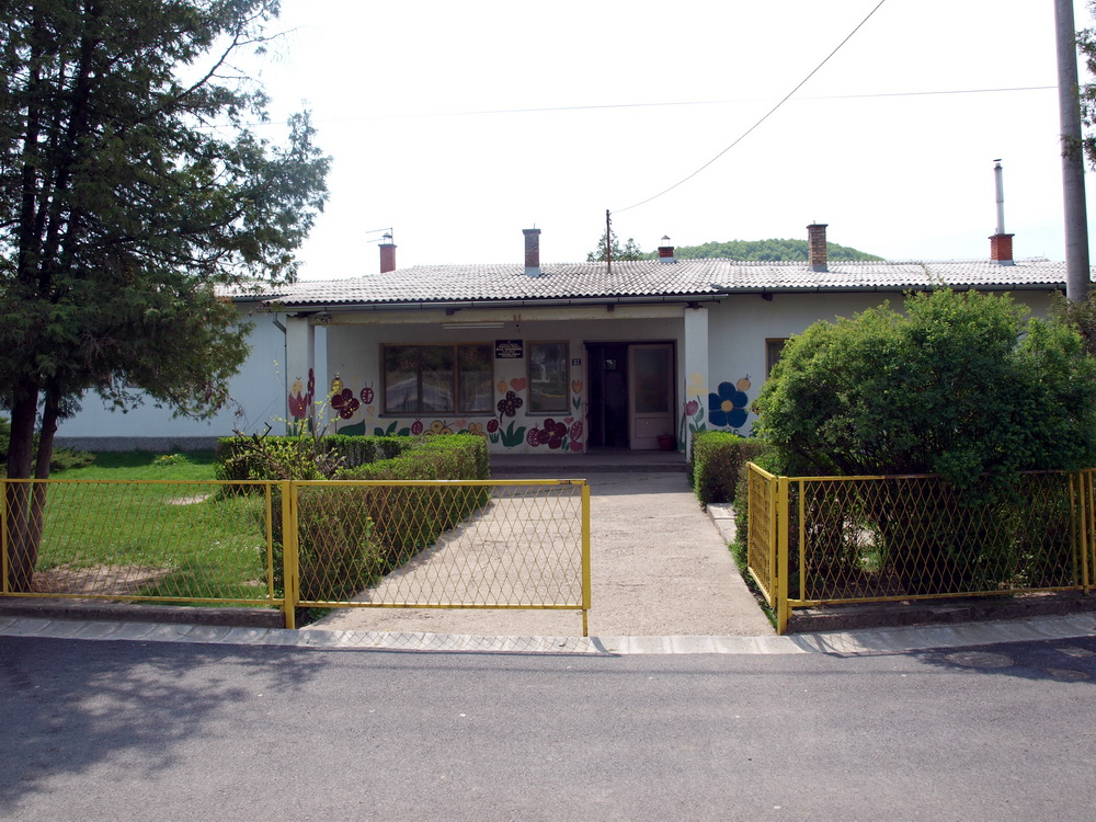 Osnovna škola Blaž Tadijanović u selu Podcrkavlje, Brodsko-posavska županija.